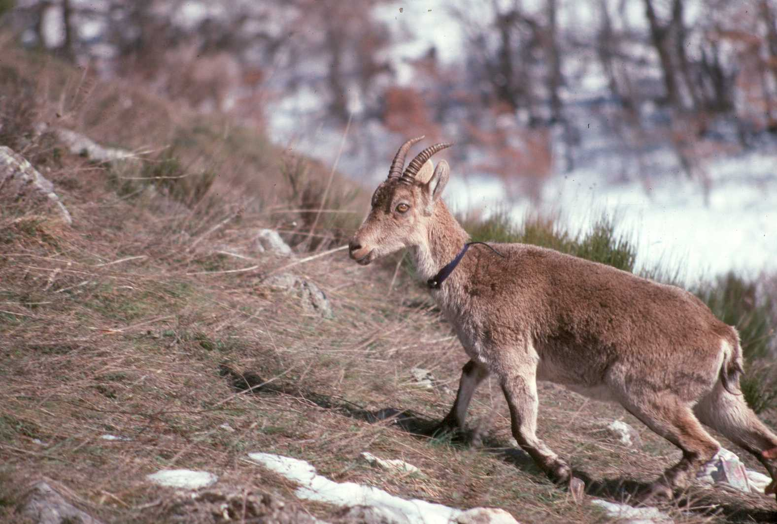 Cabra Montés Con cuello de Seguimiento